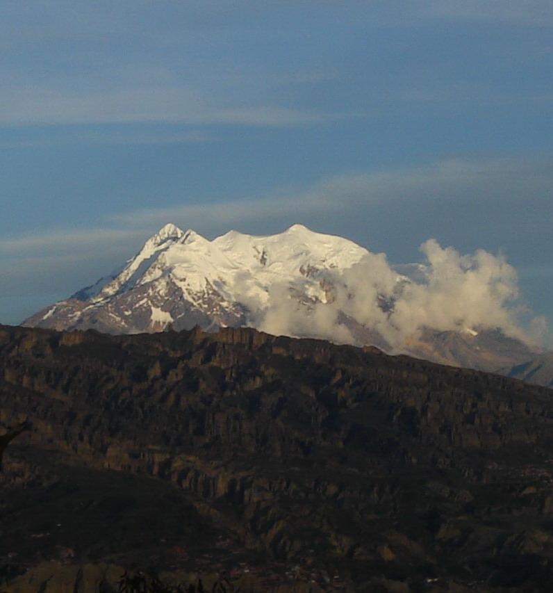 Illimani